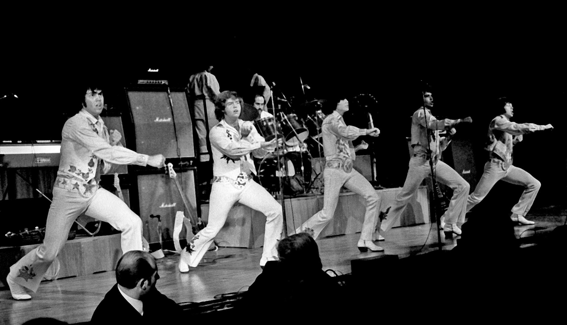 Die amerikanische Band The Osmonds mit ihrer Bühnenshow Kung Fu Fighting